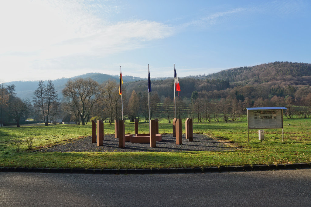 Ort der Versammlung am 6. August 1950 von Bürgern aus Strasbourg und Heidelberg um für Europa zu demonstrieren